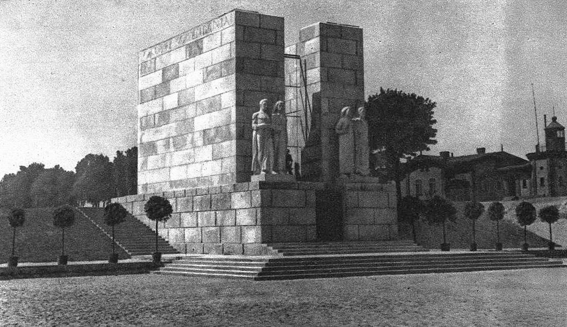 Nieistniejące mauzoleum gen. Gustawa Orlicz-Dreszera w Gdyni (1939).